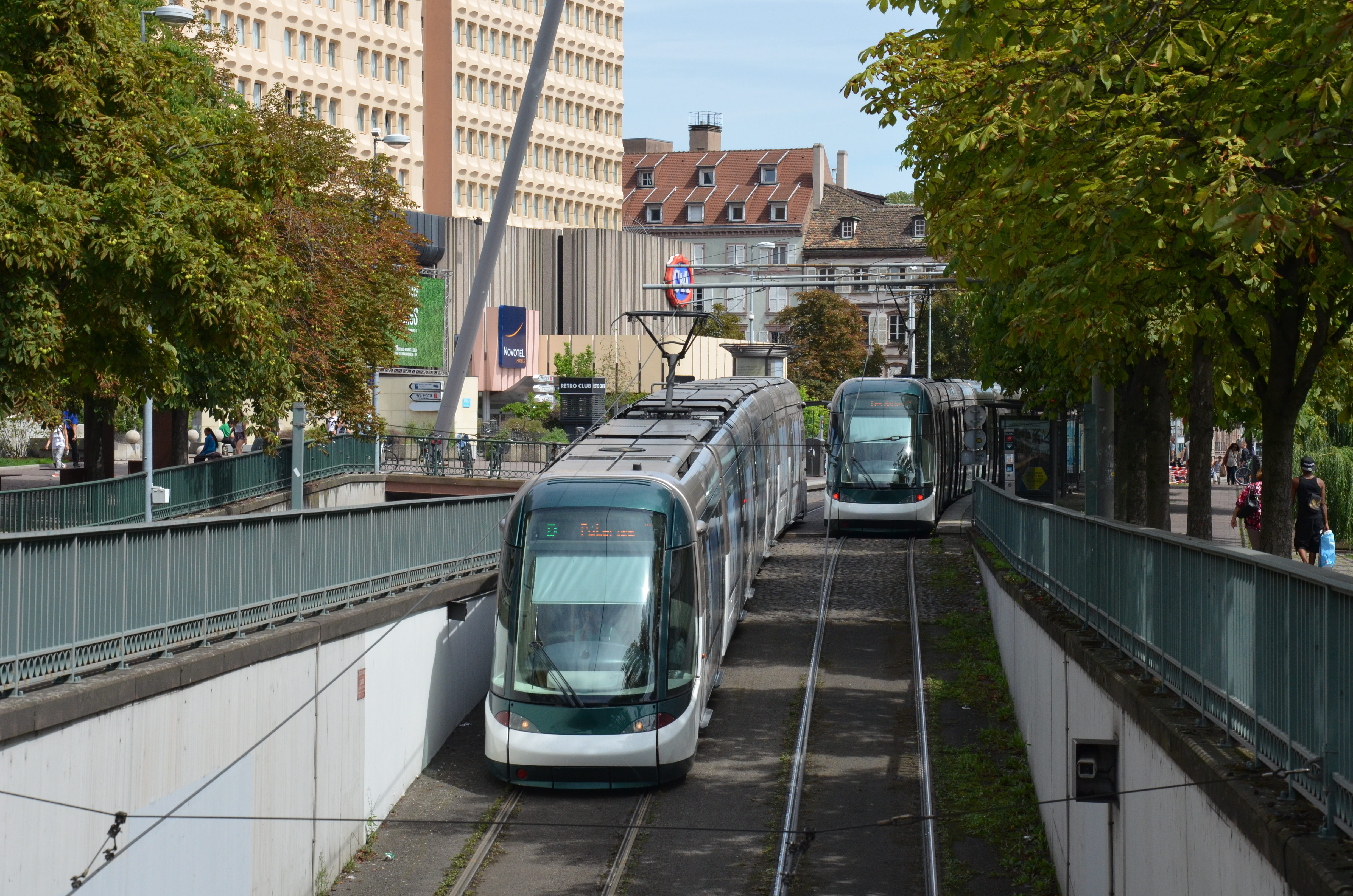 Alstom Citadis 403 quittant la station Ancienne Synagogue Les Halles, sur la ligne D du réseau CTS de Strasbourg.